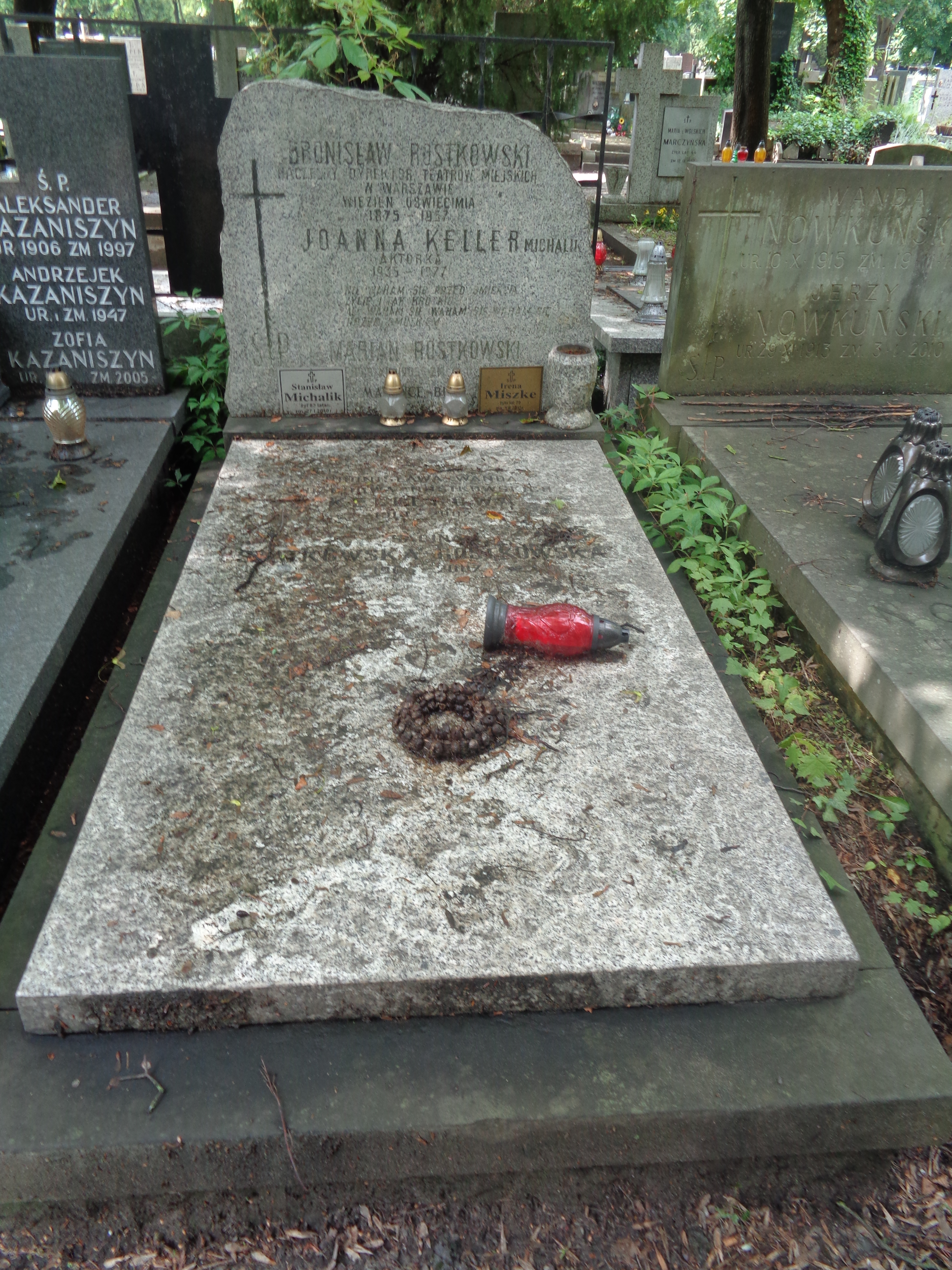 Grób Joanny Keller-Michalik na Cmentarzu Powązkowskim